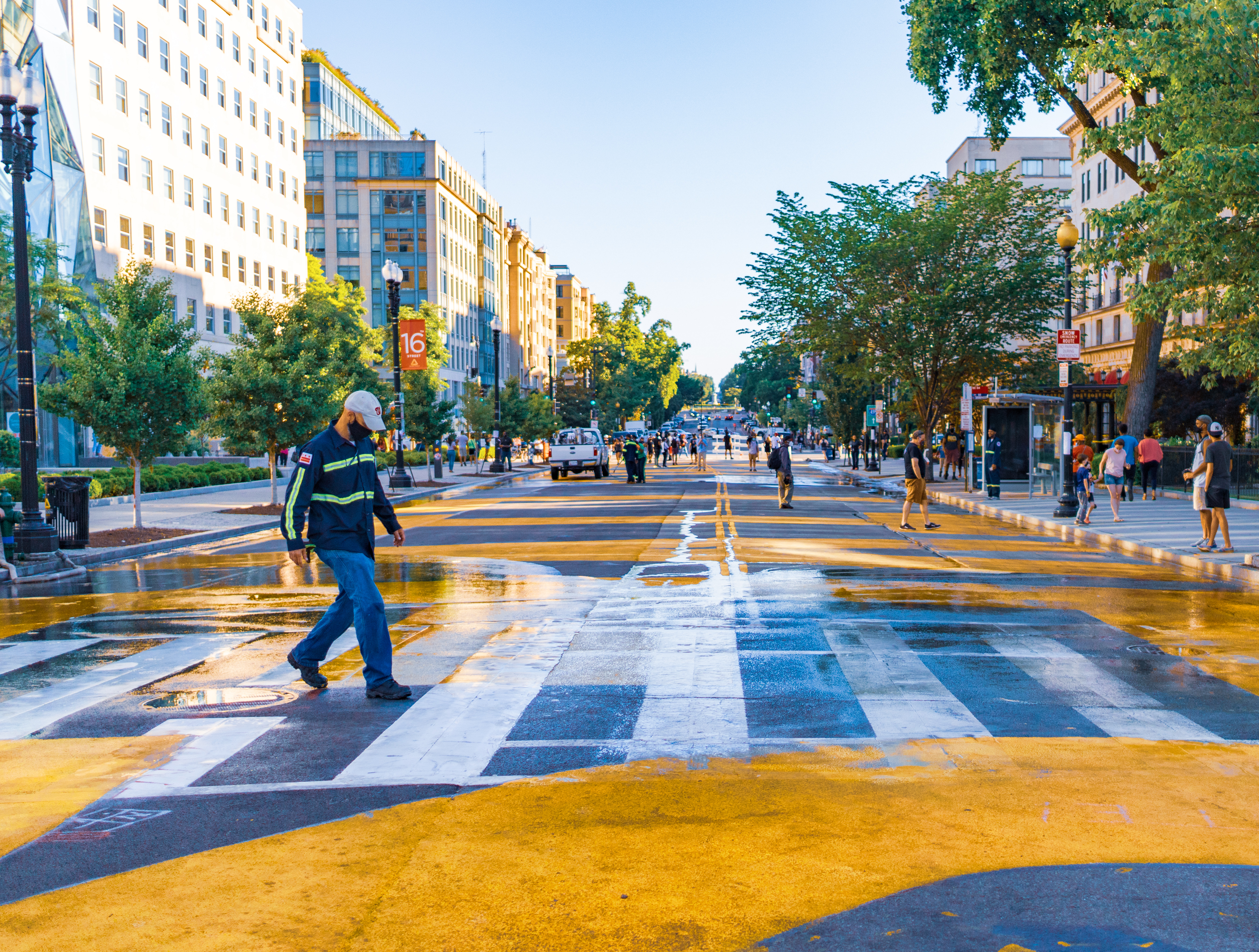 2020.06.07 Black Lives Matter Plaza, Washington, DC USA